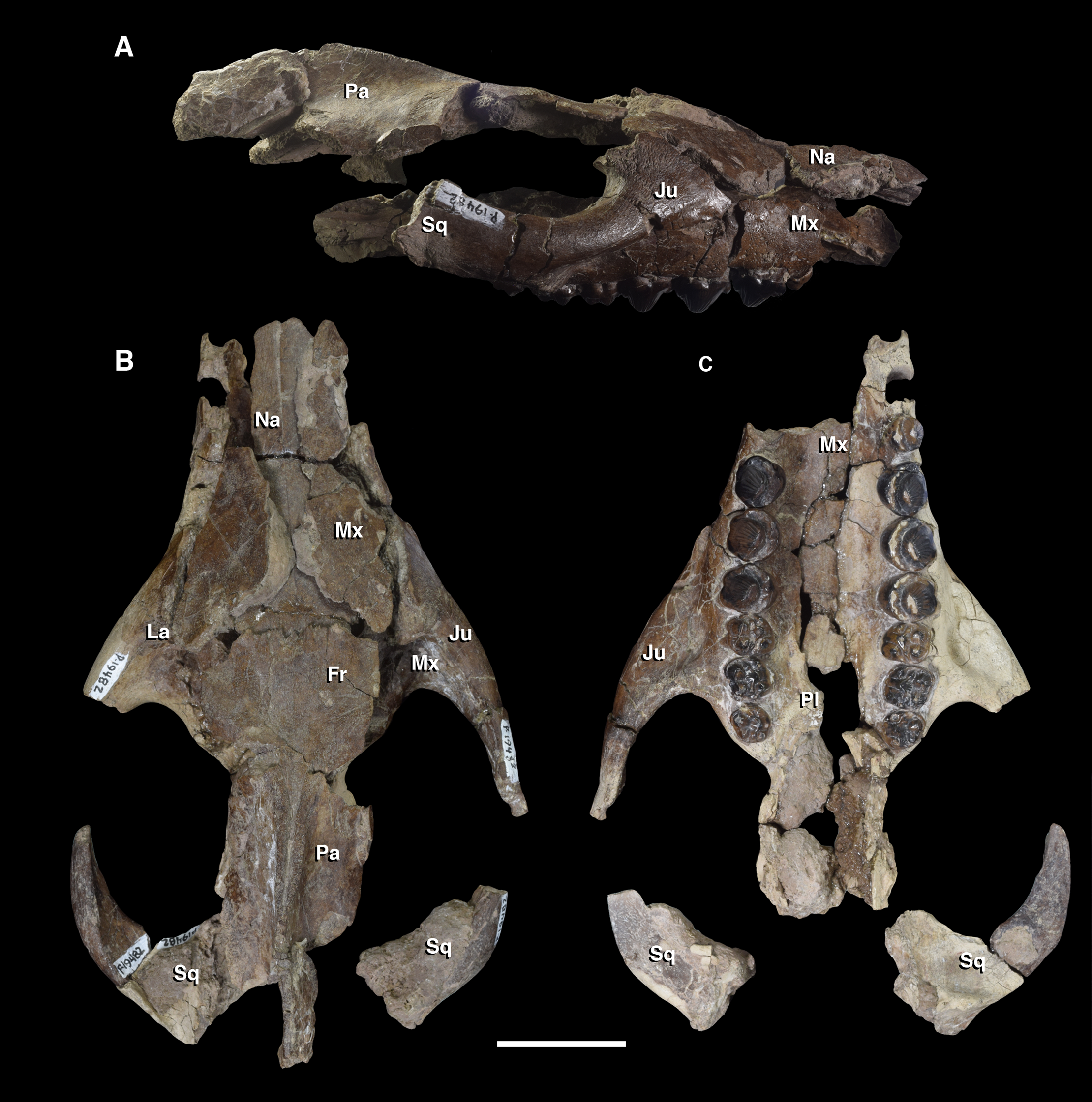 Skull of Periptychus carinidens (NMMNH P-19482). (A) lateral view; (B) dorsal view, (C) ventral view. Abbreviations:; Fr, frontal; Ju, jugal; La, lacrimal; Mx, maxilla; Na, nasal; Pa, parietal; Pl, palatine; Sq, squamosal. Scale bar: 30mm.